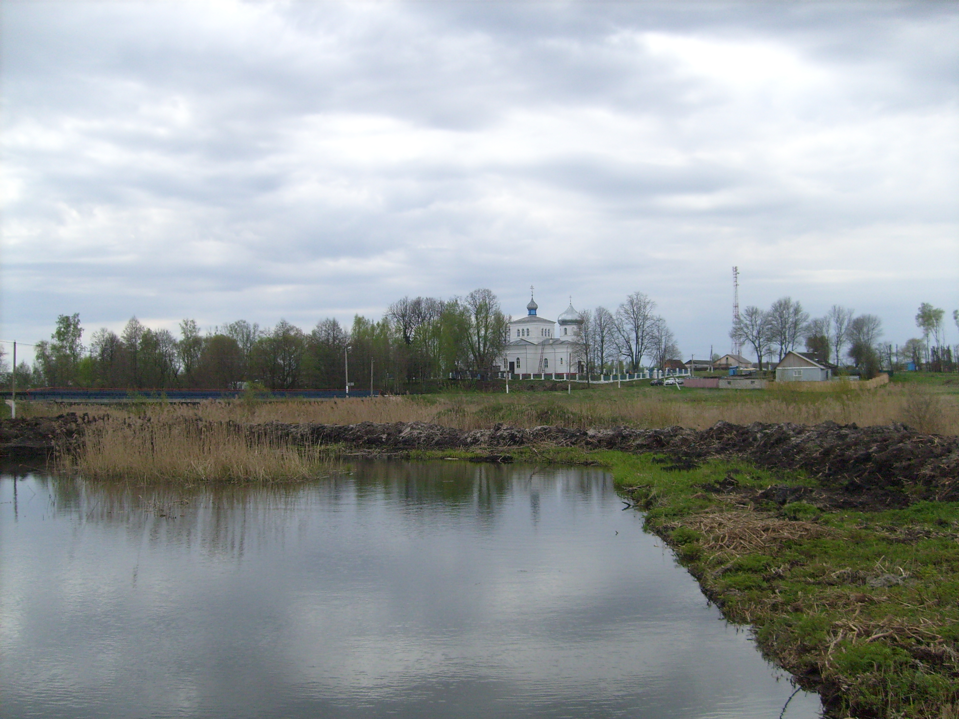 Свято-Успенская церковь в агрогородке Сухари This is a photo of Belarusian heritage monument. Reference number: 513Г000498 ( WLM)